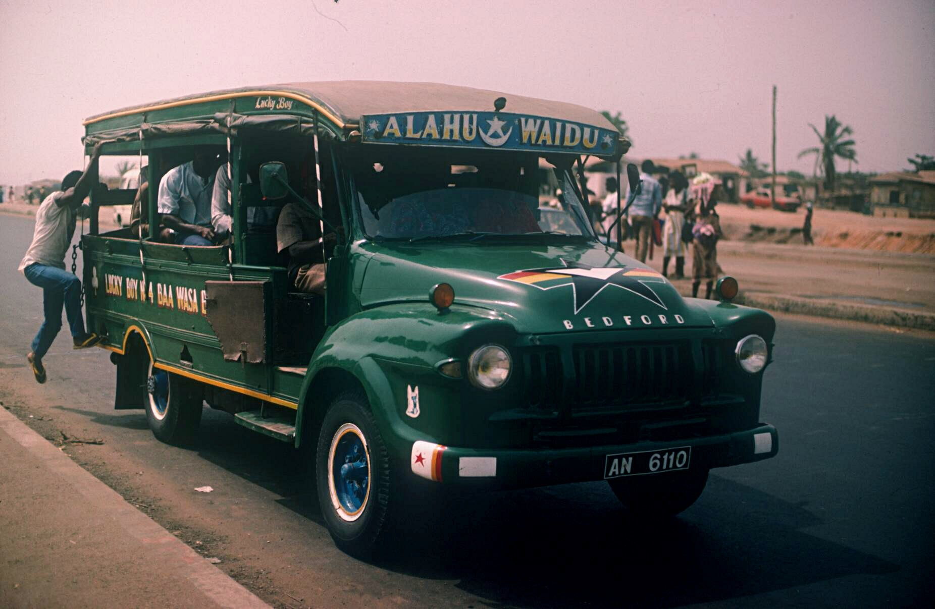 Bedford TJ Umbau auf Nahverkehrsmittel, Accra, Ghana